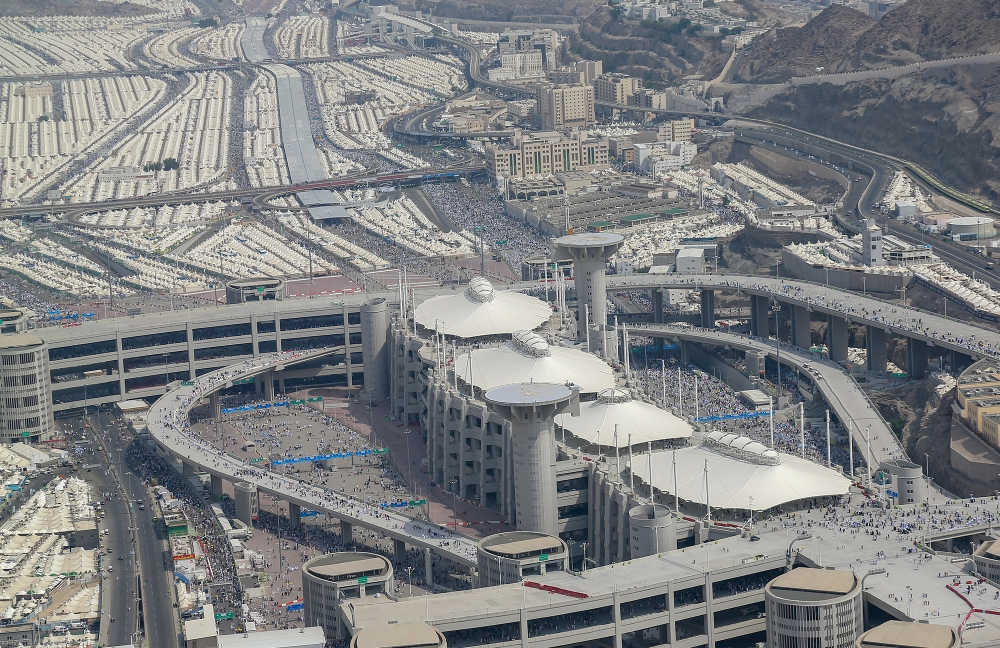 منشأة الجمرات حيث يرمي الحجاج الجمرات الثلاث